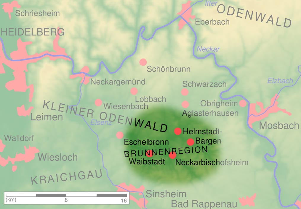 Geografische Karte der Brunnenregion